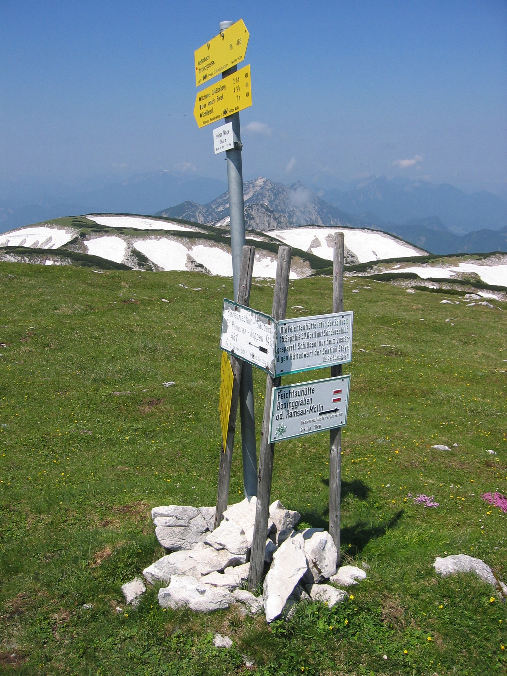 Wegweiser am Hohen Nock, Sengsengebirge, Oberösterreich